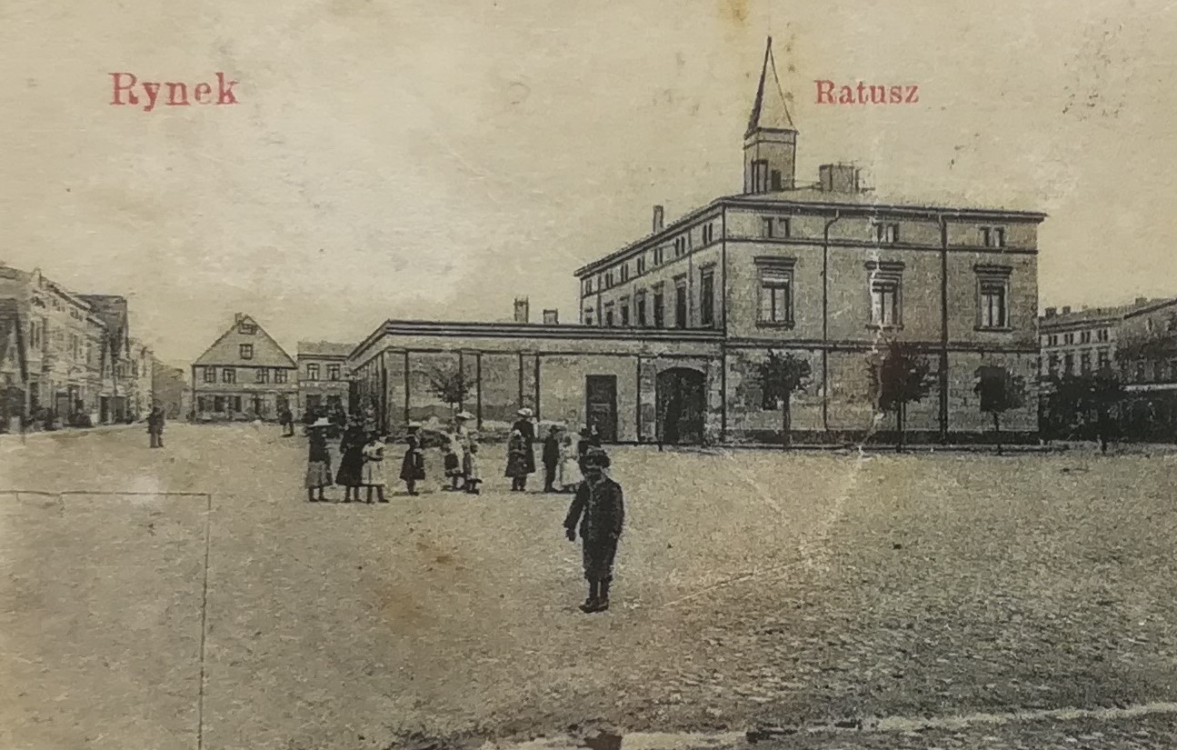 Ratusz w Swarzędzu. 1909 r.